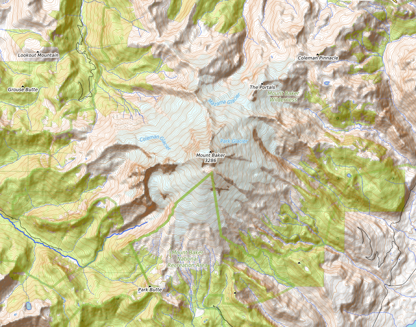 carte réalisée sur umap This map may be incomplete, and may contain errors. Don't rely solely on it for navigation.